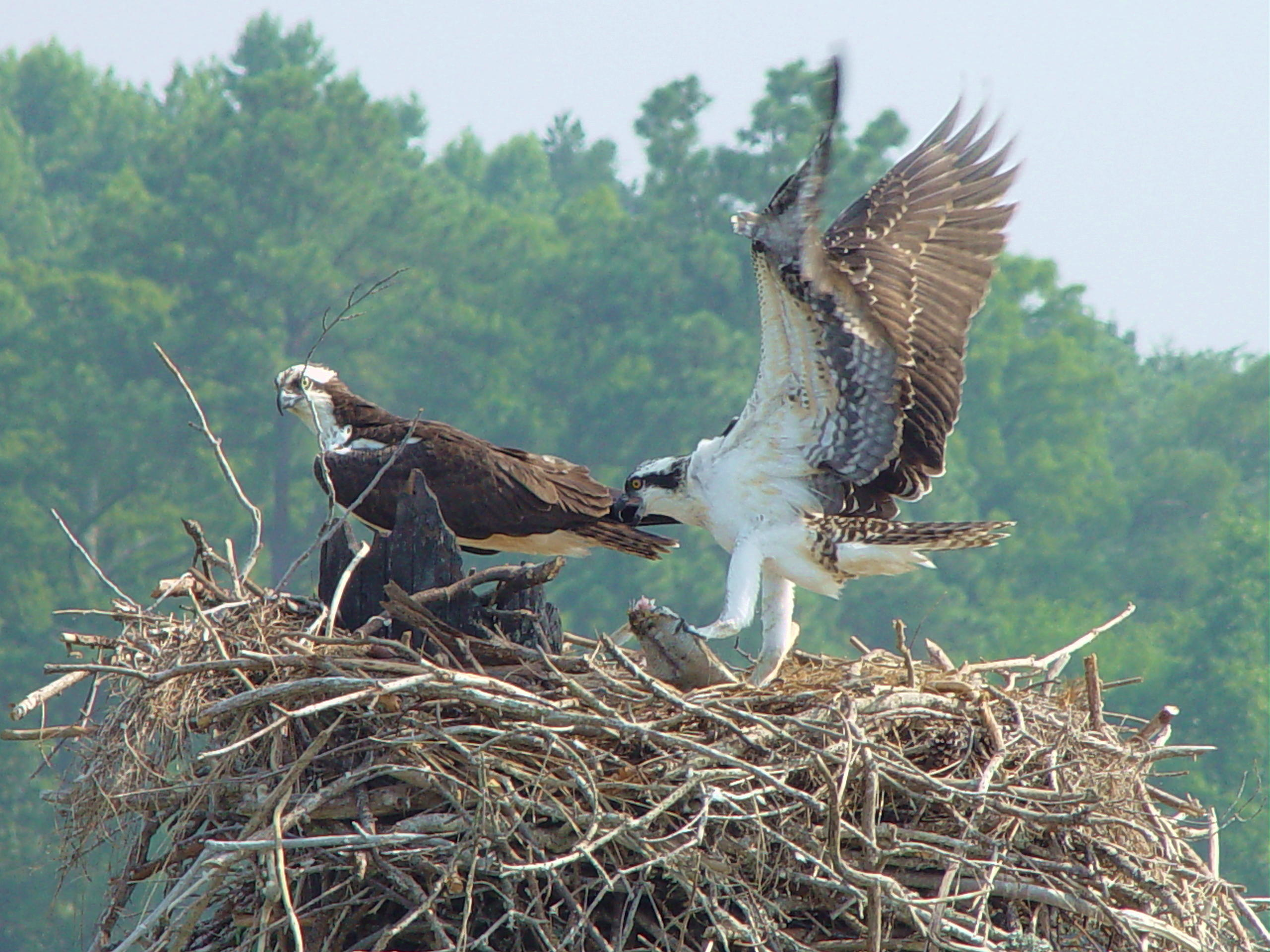 Sierra Exif JPEG